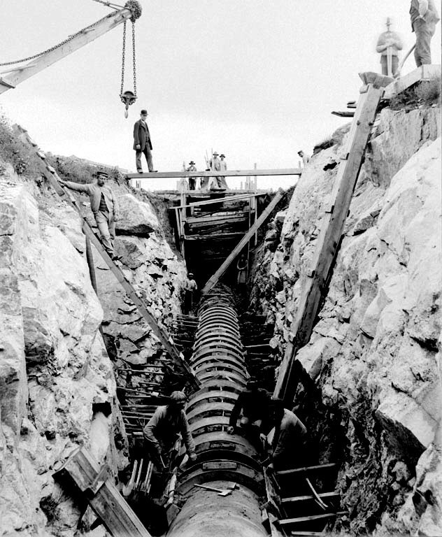 Läggning av avloppsledningar på Östermalm, Stockholm